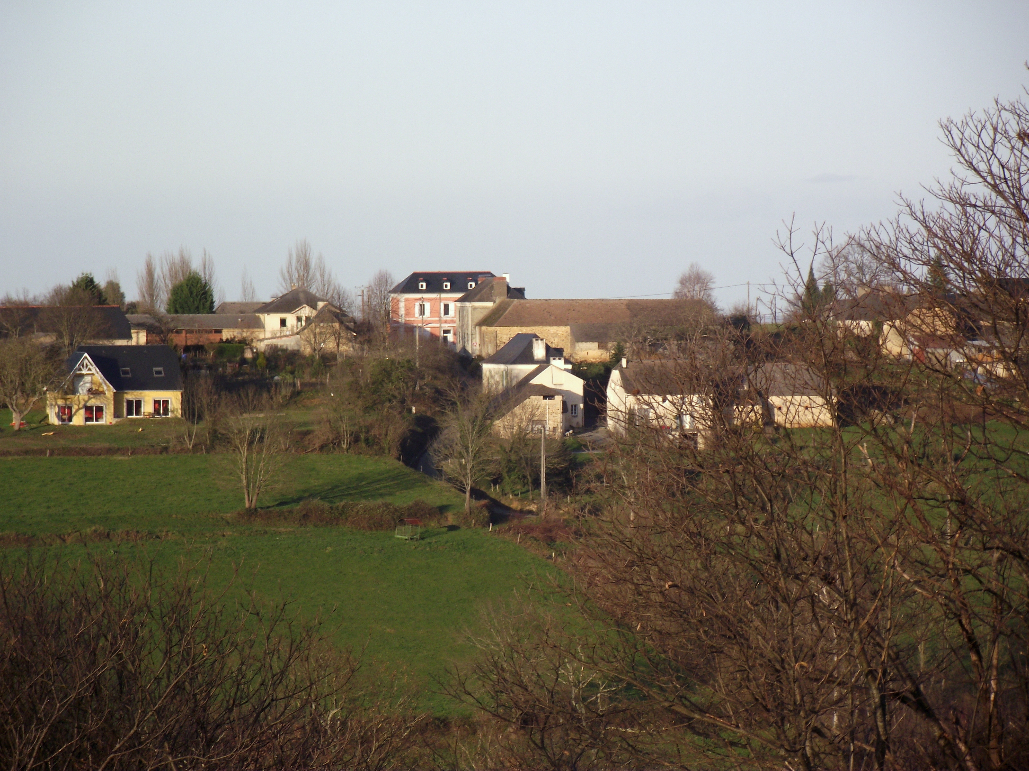 Centre du village de Visker (Hautes-Pyrénées, France)